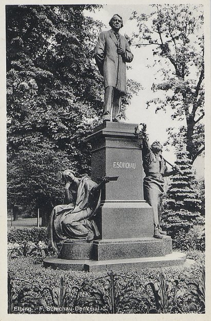 Denkmal für den Unternehmer Ferdinand Schichau in Elbing (Westpreußen), beim Lustgarten an der Schichaustraße; Schöpfer des 1900 eingeweihten Denkmals war der Berliner Bildhauer Wilhelm Haverkamp.